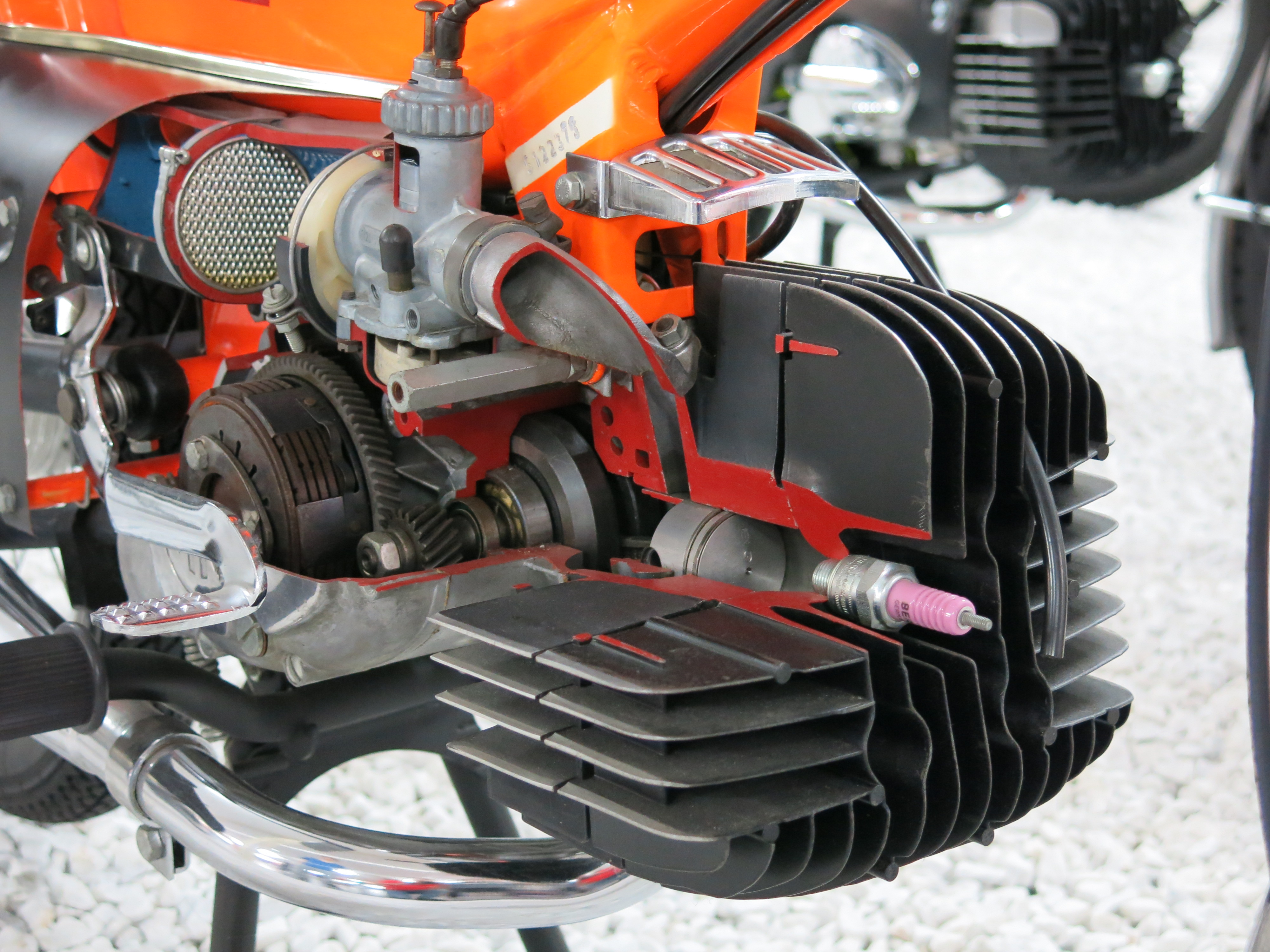 Schnittmotor Kreidler Florett RS B15-20.